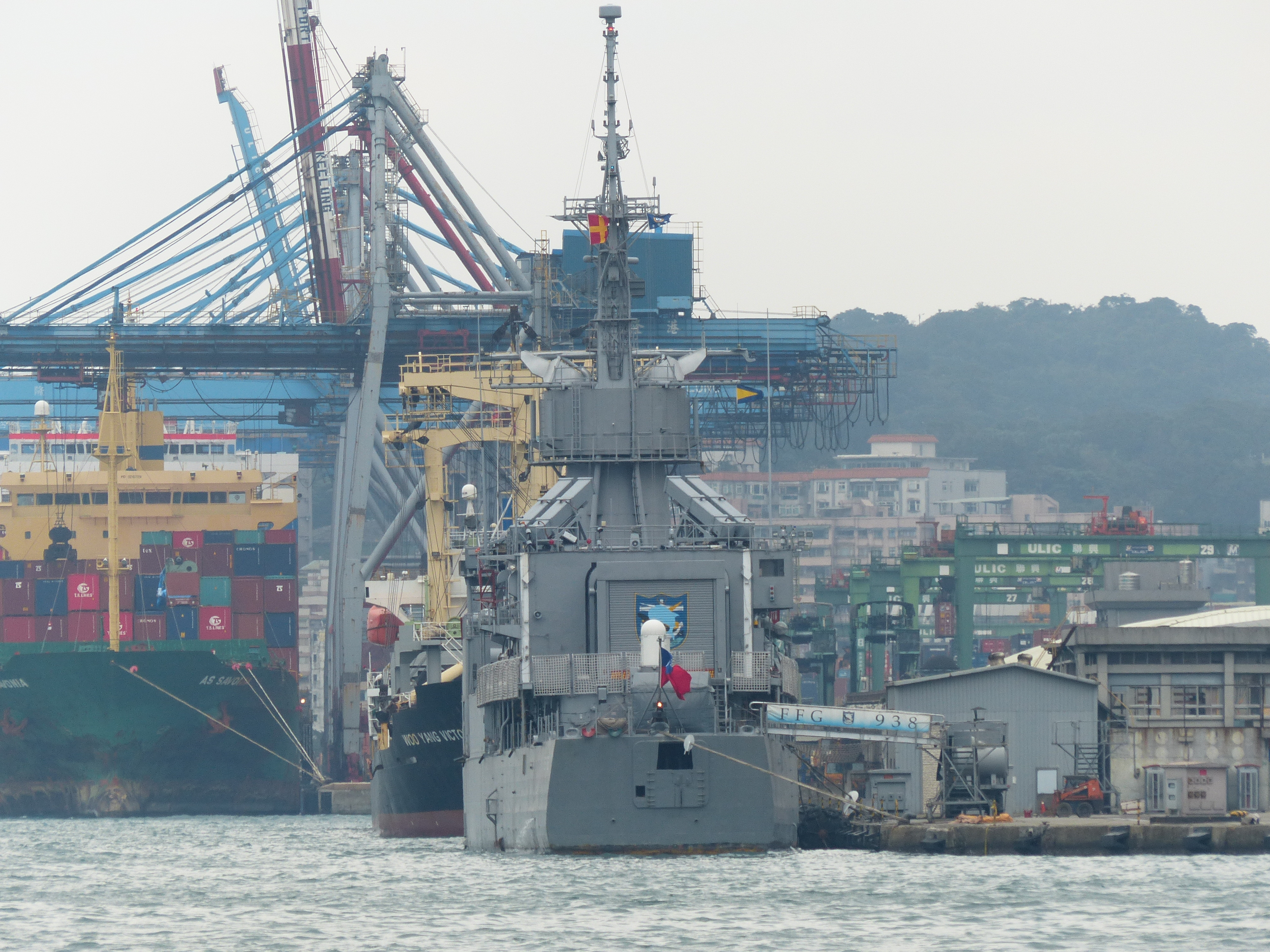 停泊於基隆港東6號碼頭的中華民國海軍巡防艦寧陽（FFG-938）後方。